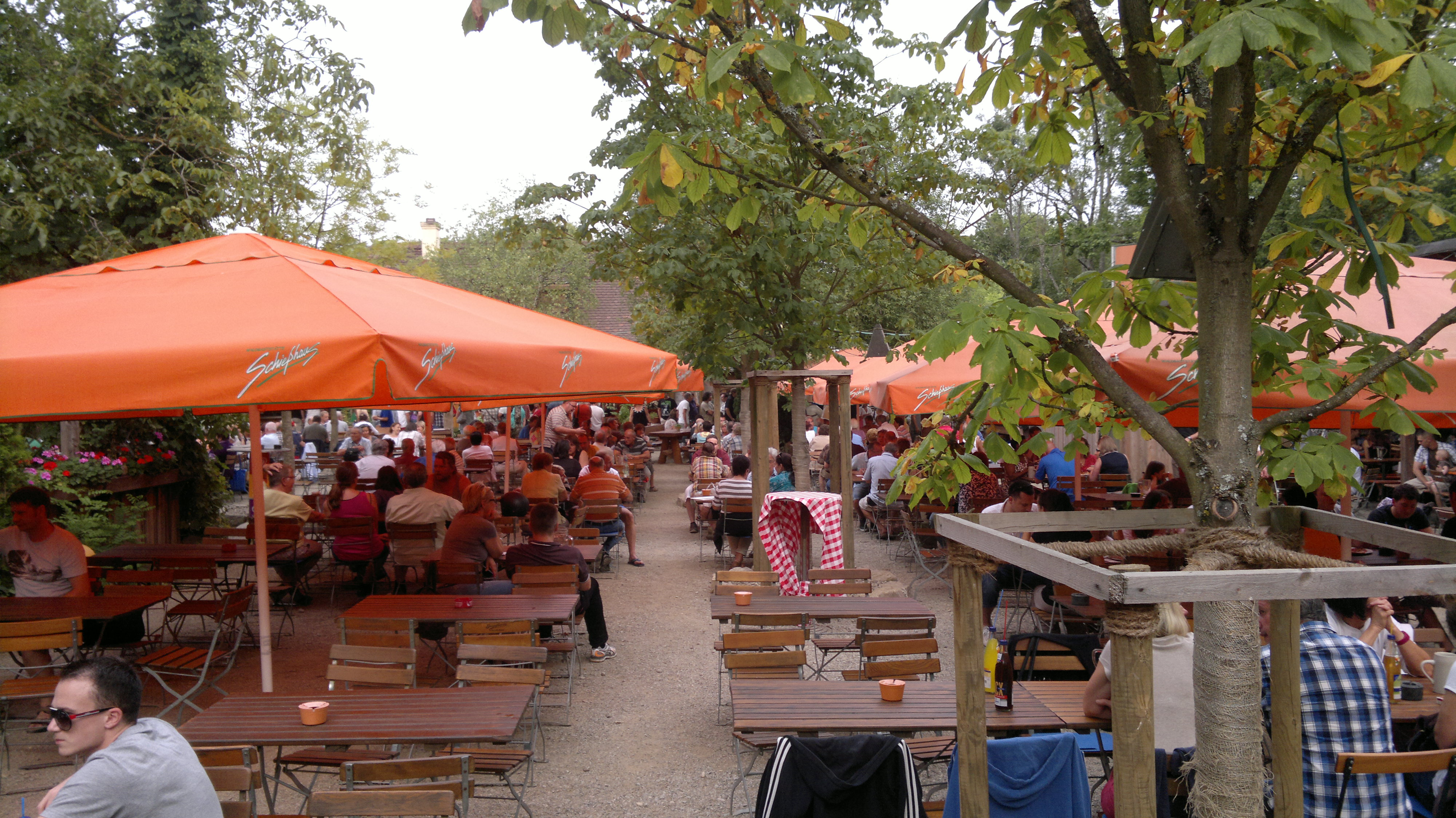 Schweinfurt, Germany